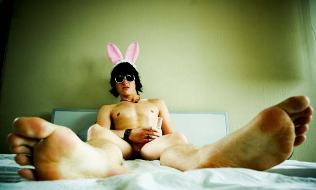 Pressefoto "Little Paris"